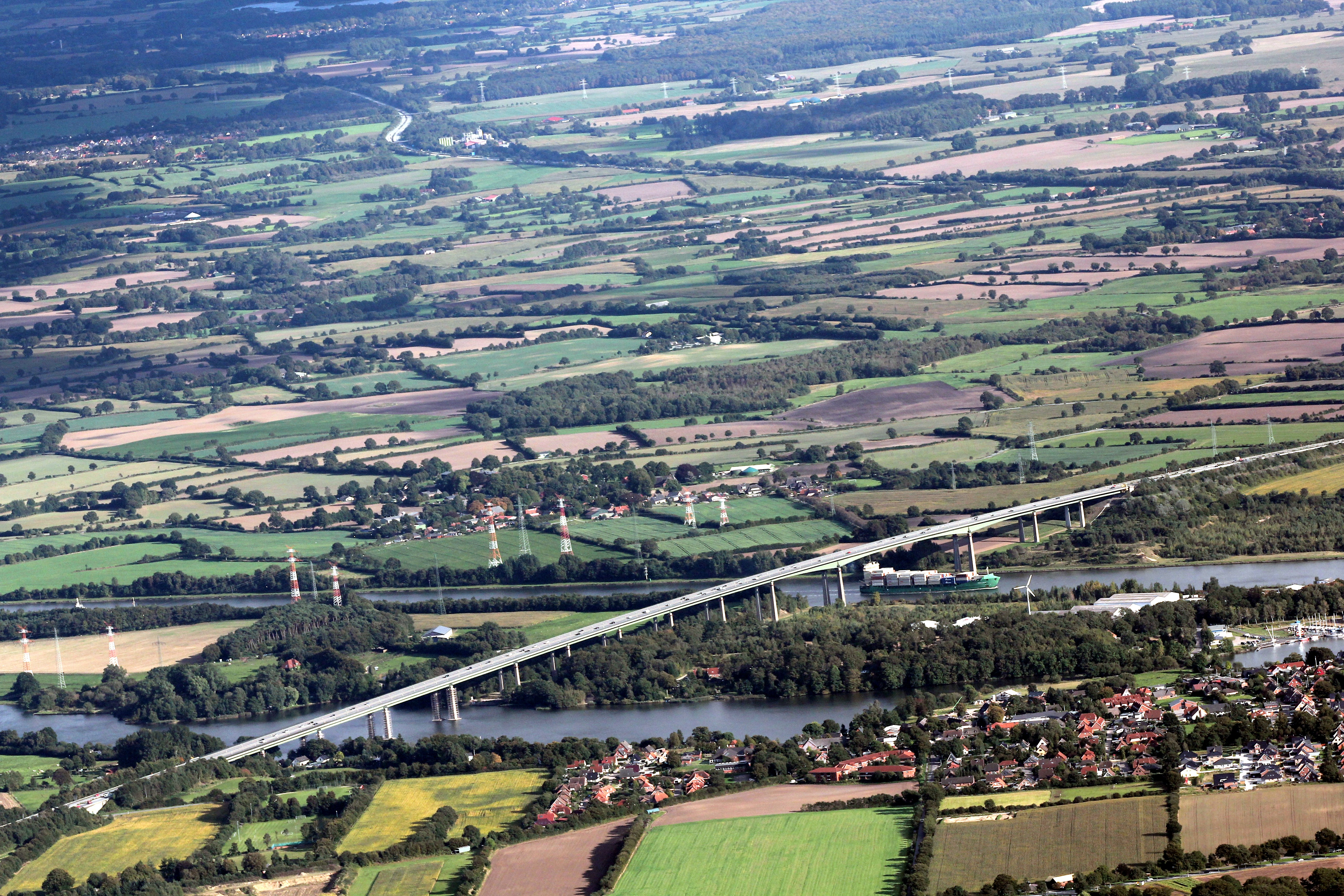 Luftbild, Blickrichtung Südost: Rader Insel und Rader Hochbrücke mit der Bundesautobahn 7. Oben links die Bundesautobahn 210 nach Kiel.